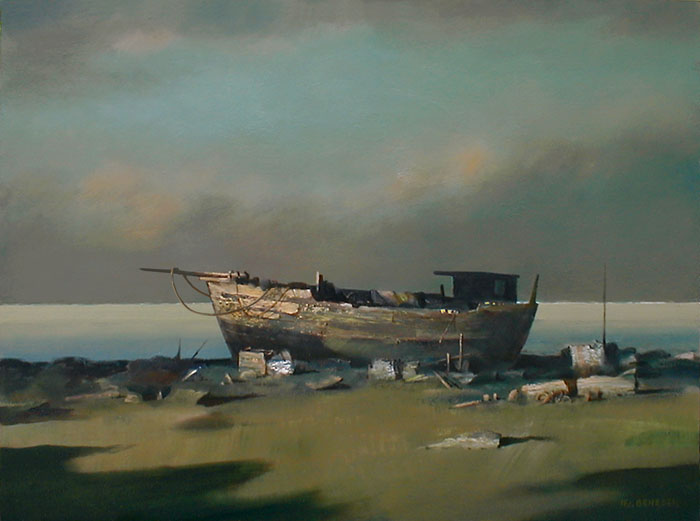 Benedek Jenő, ifj. (Csongrád, 1939. június 13.– 2019. augusztus 20.) festőművész alkotása: Bárka, 2002, olajfestmény, 60x80 cm